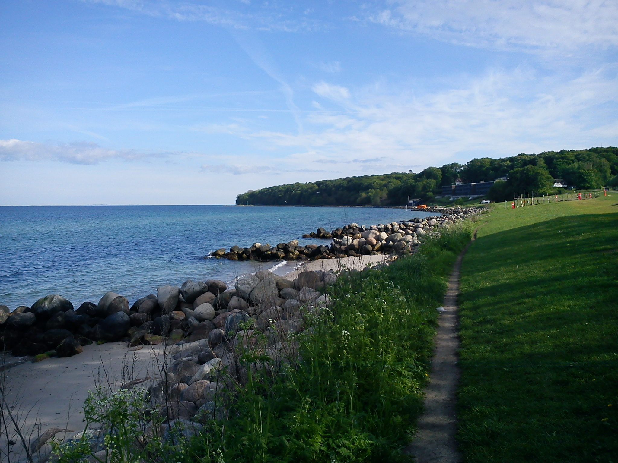 Aarhus Bugten langs Strandvejen. Forberedelser til 'Sculpture by the Sea' kan ses i det fjerne.